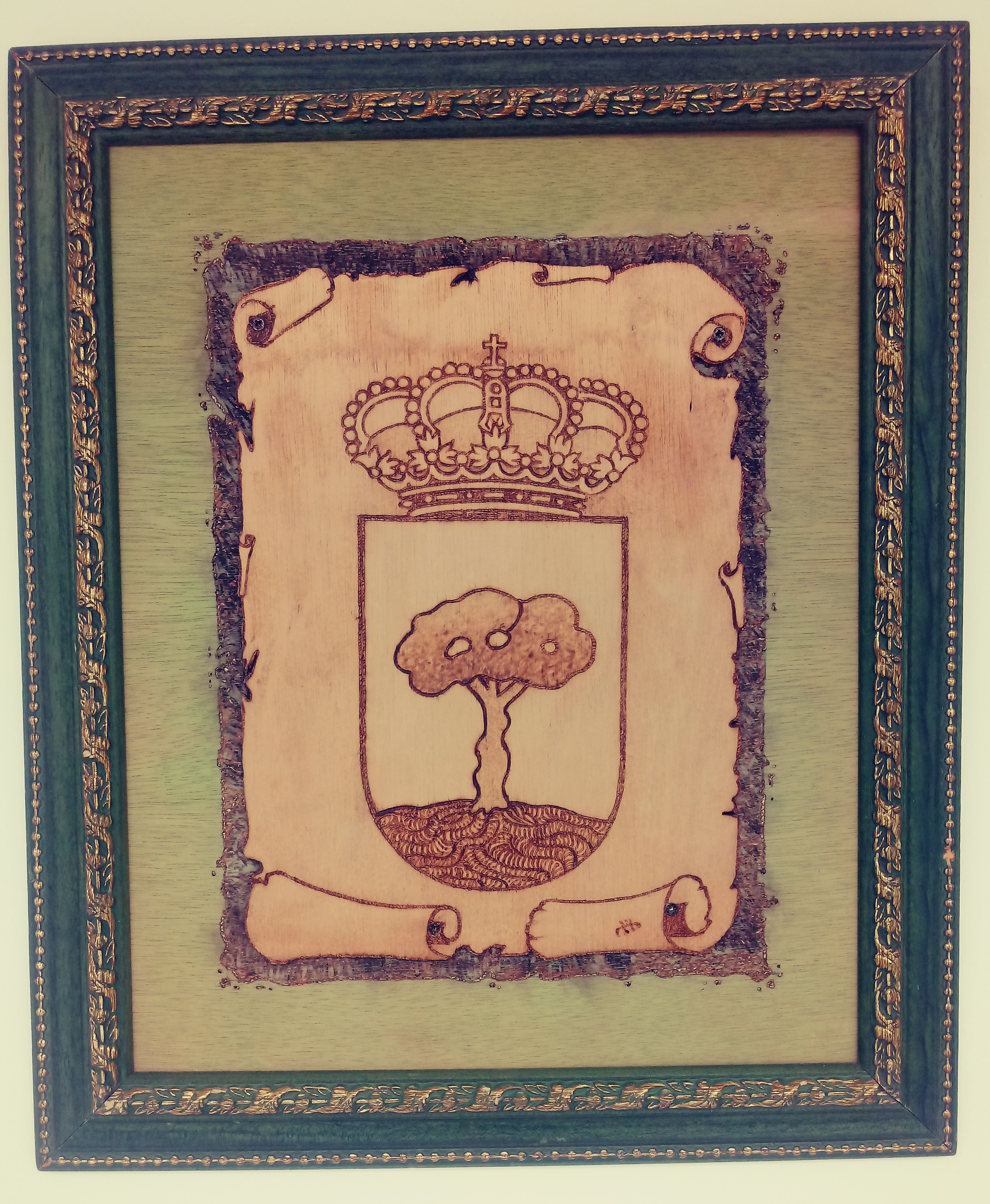 Pirogravado co escudo heráldico do Concello do Pino que se atopa no CSC Luís Seoane, no Pedrouzo.